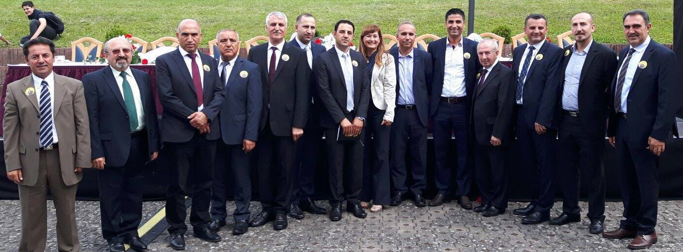 Jahreshauptversammlung der Föderation Suryoye Deutschland (HSA) in Warburg Westfalen.